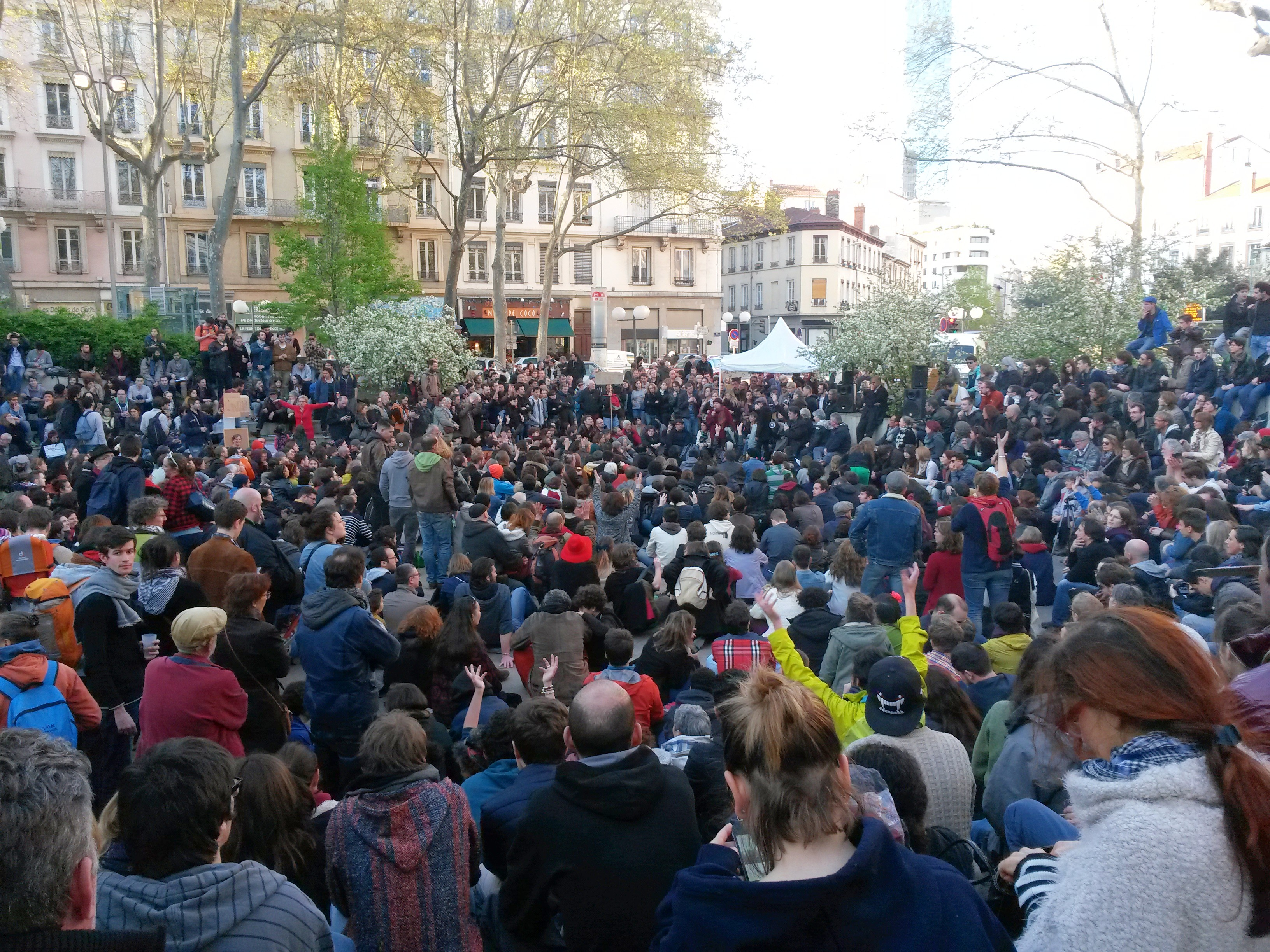 Assemblée Générale de la Nuit Debout Lyon, le 9 mars 2016, Place Guichard